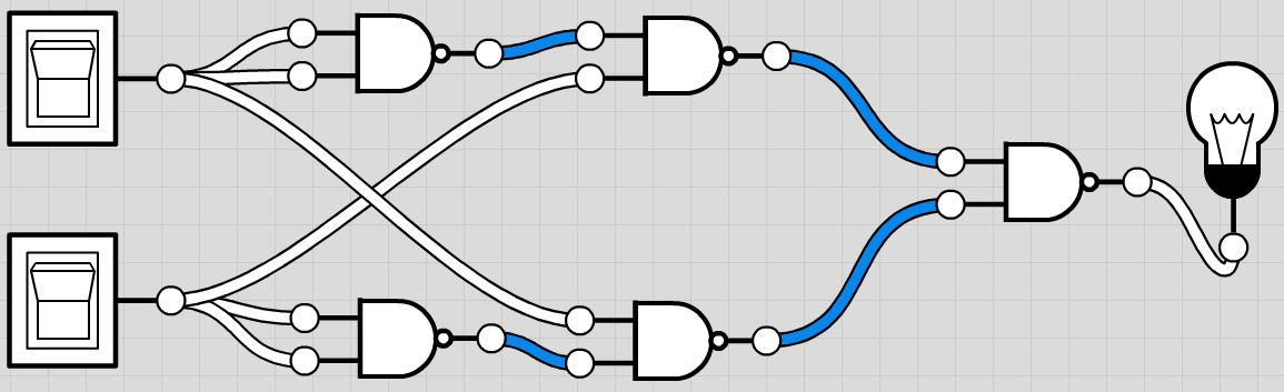 cicuito simmples feito só com nand sem portas desnecessarias